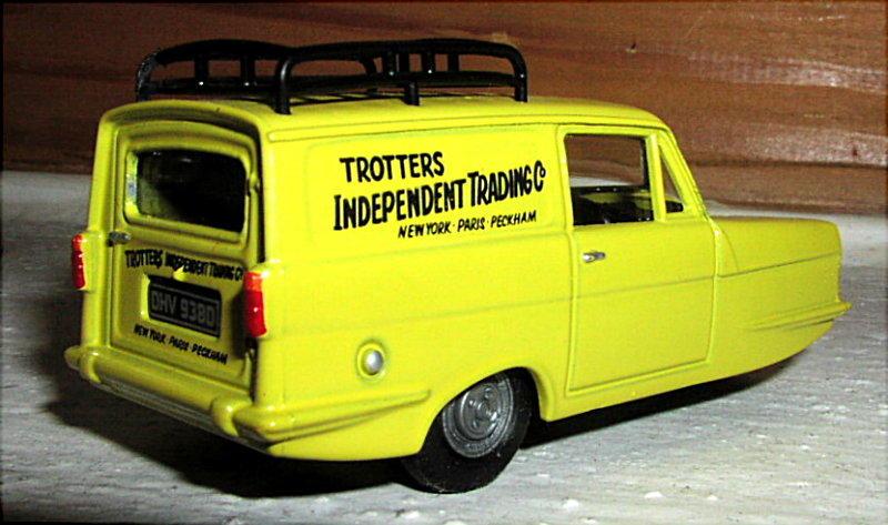 Reliant Regal Super Van II (Model 1/43)